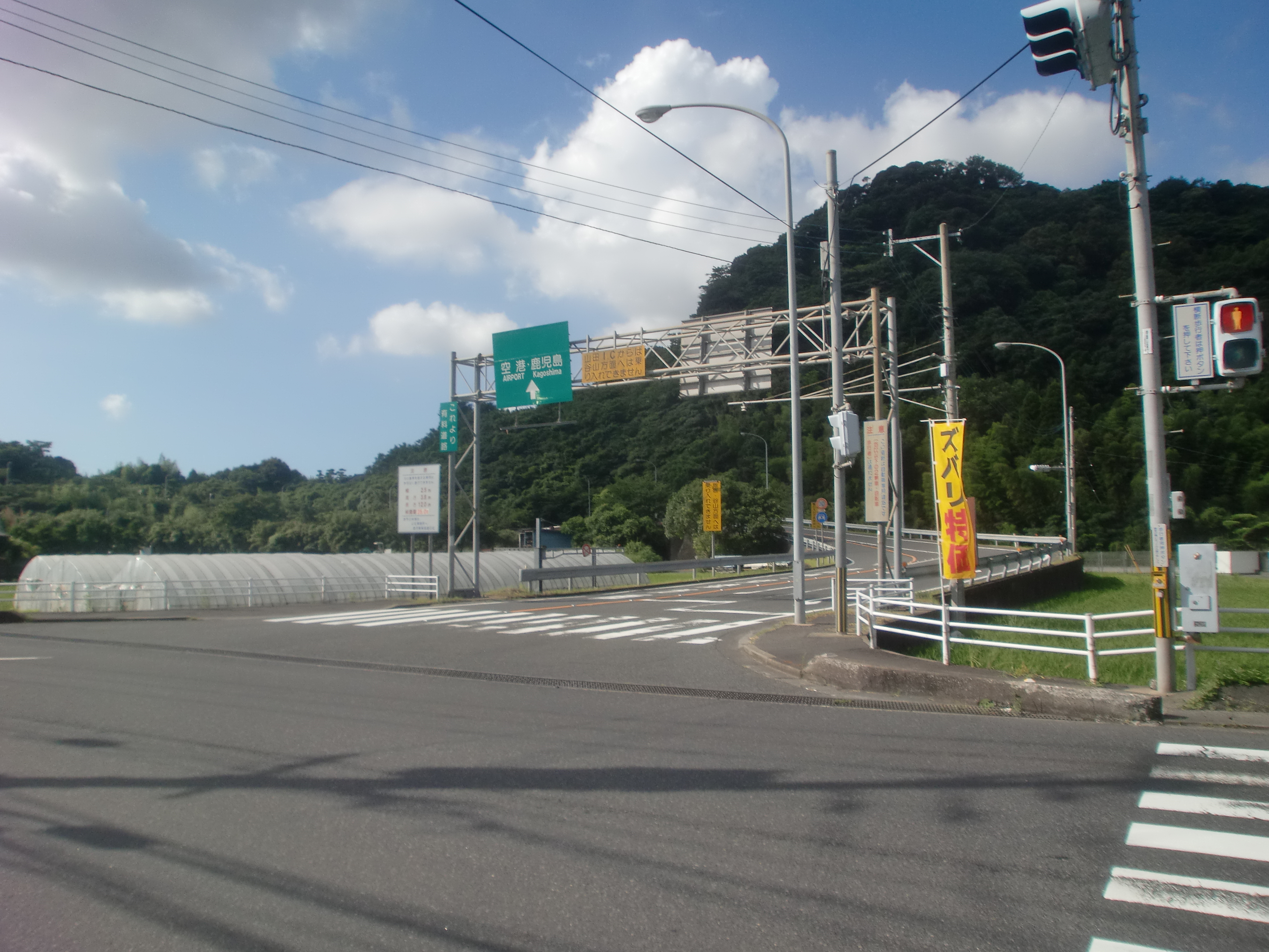 山田インターチェンジの入口。